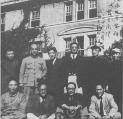 参加中国人民政治协商会议第一届全体会议的文艺界小组同志合影。自左至右，前排：艾青、巴金、史东山、马思聪；后排：曹靖华、胡风、徐悲鸿、郑振铎、田汉、茅盾。（北京茅盾故居藏品）